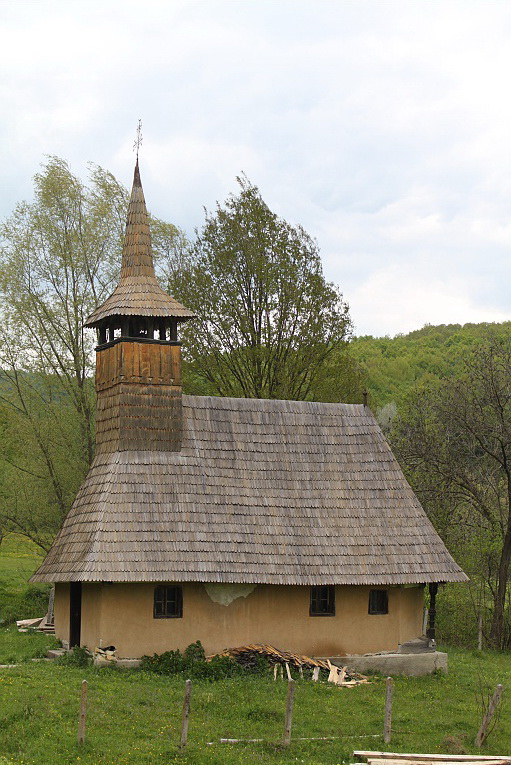 Biserica de lemn din Măleni, județul Sălaj.